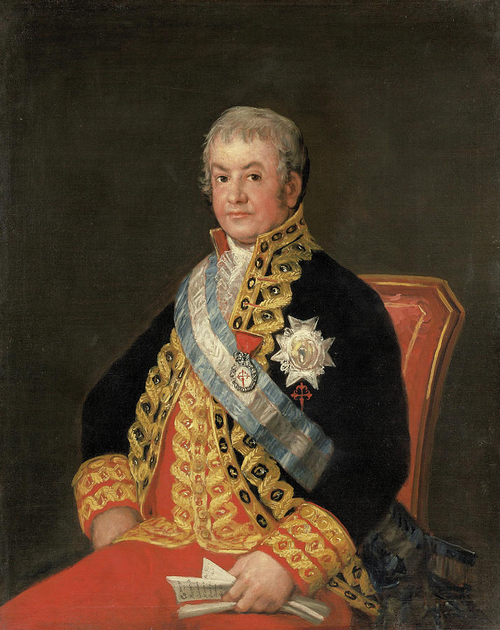 Retrato de José Antonio Marqués Caballero